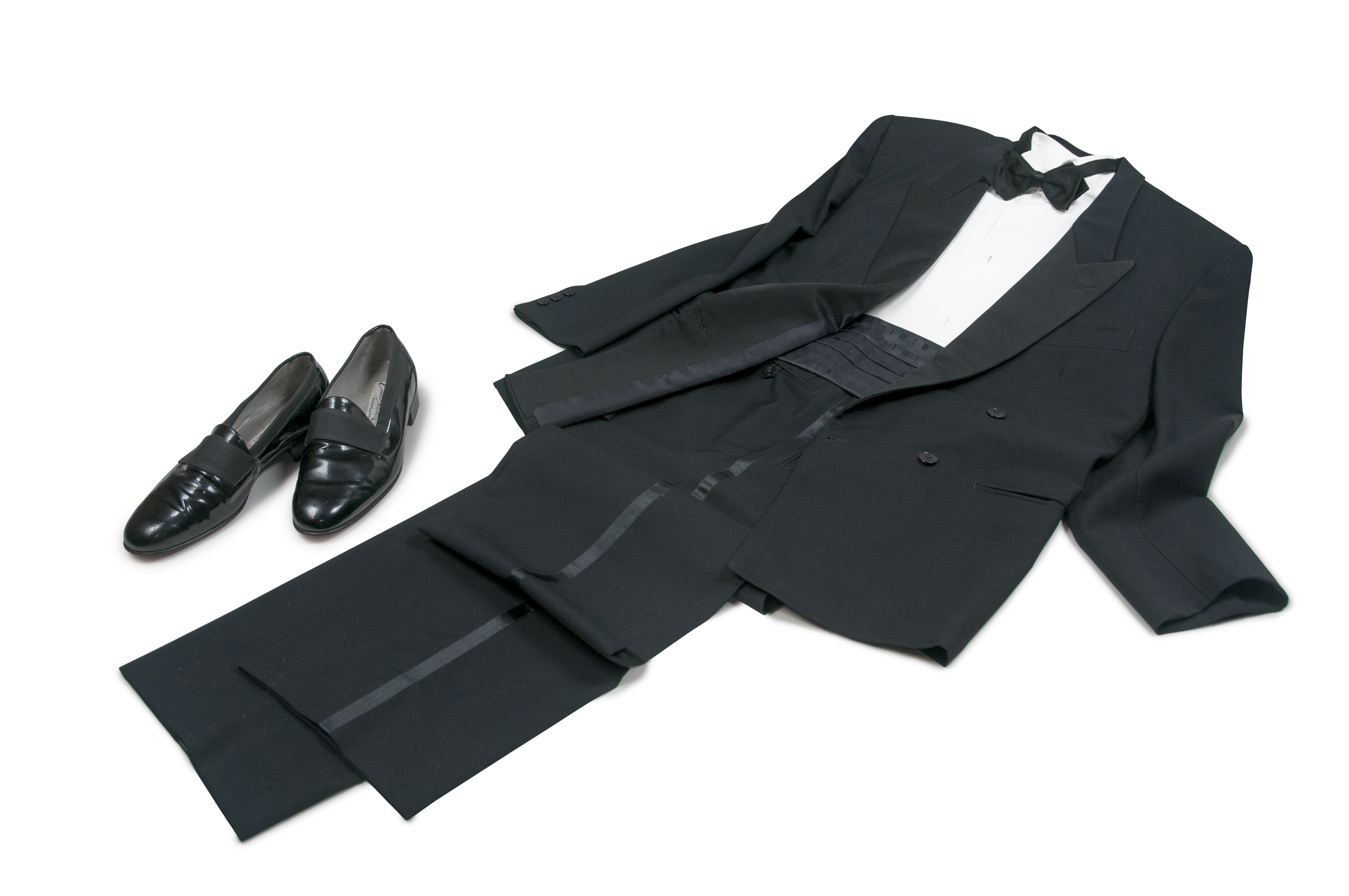 Esmóquin, saco y pantalón de alpaca con resaltes de raso de seda. Camisa con cuello "palomita". oño y faja de seda. Zapatos de charol con banda de gros. Traje de gala usado por el Presidente Carlos Saúl Menem en diversos actos y reuniones oficiales en la Argentina y en el exterior.